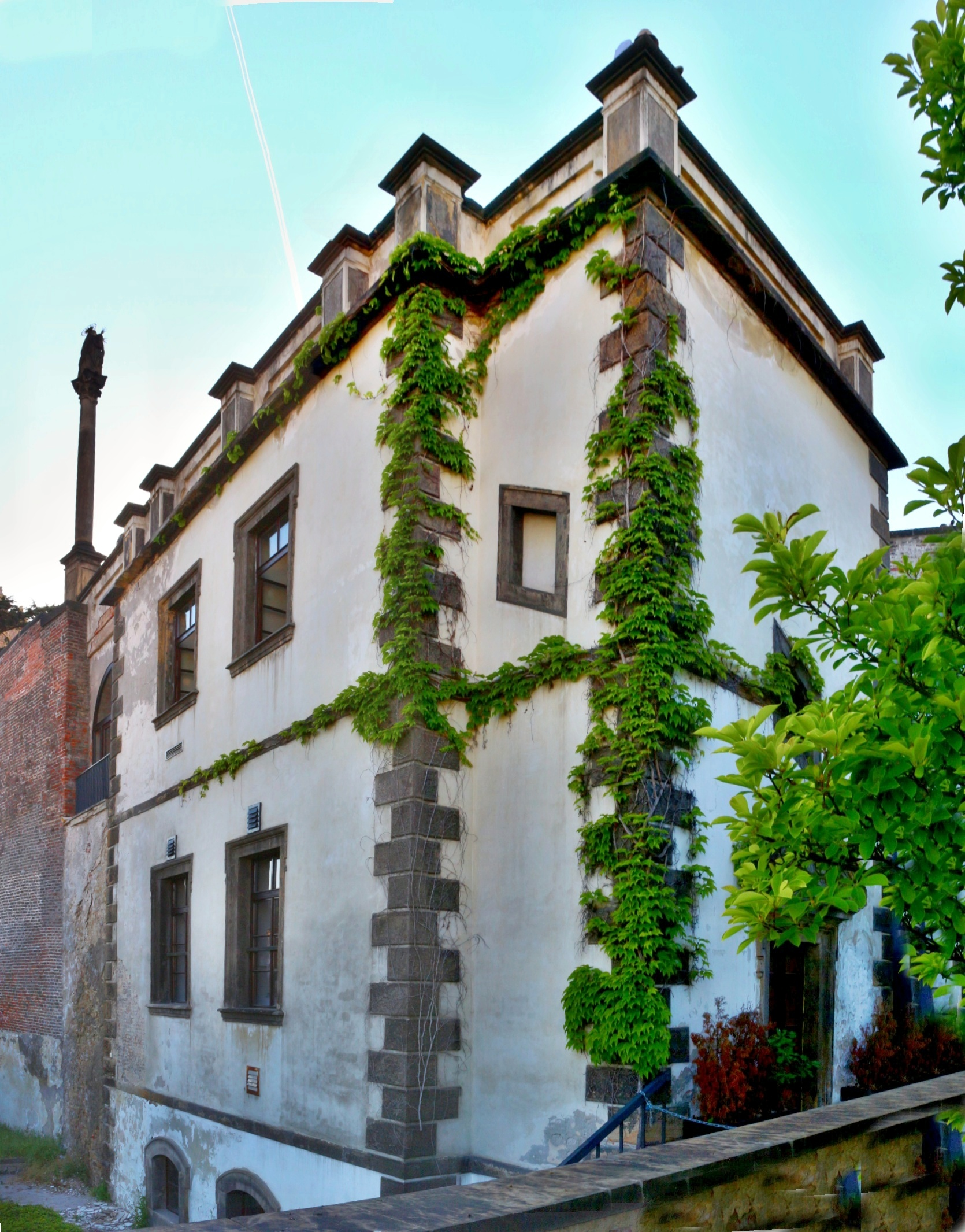 Kaple Panny Marie Einsiedelnské na Hradčanech